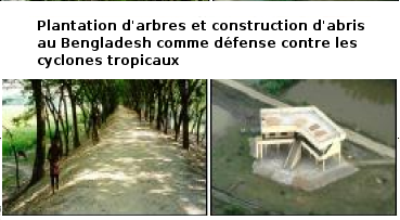 Plantation dàrbres et construction d'abris au Bengladesh pour amenuiser les effets des cyclones tropicaux.